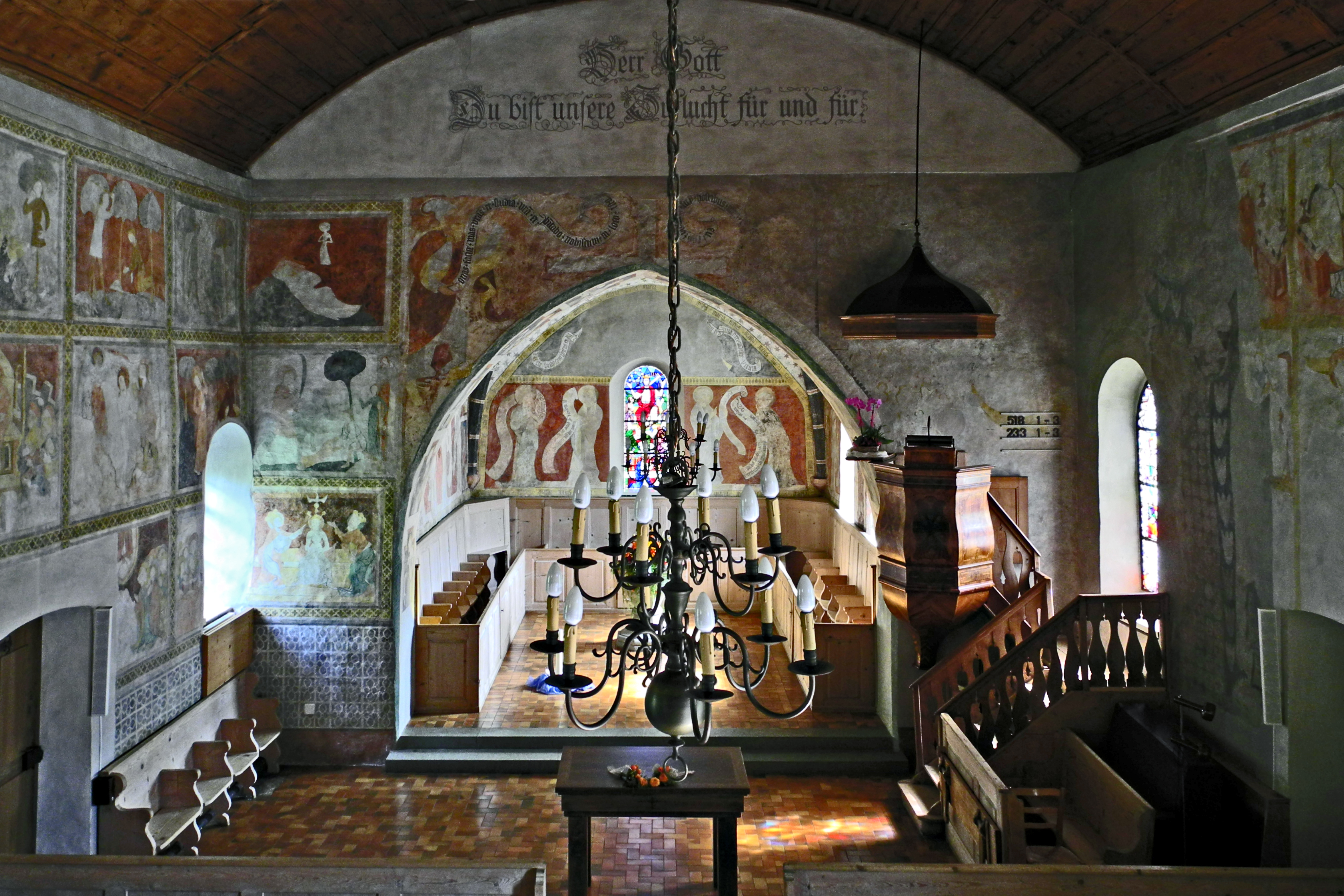 Erlenbach im Simmental, Bilderbibel, Wandmalereien in der reformierten Kirche